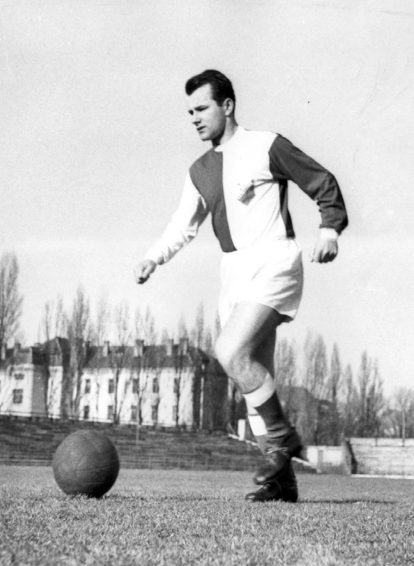 Vujadin Boškov (1931-2014)jugoslovenski fudbalski reprezentativac. Foto:Stevan Kragujević (po odobrenju kćerke Tanje Kragujević)